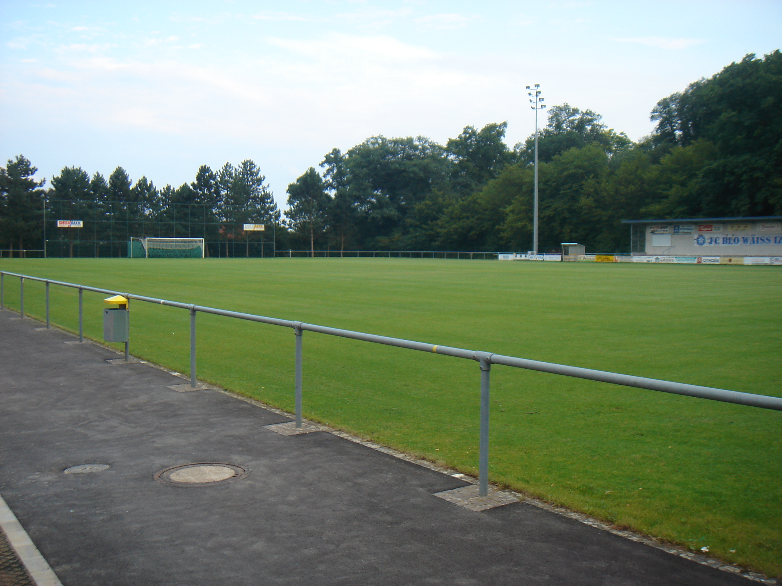 Den Izeger Fussballsterrain (100 m x 64 m). Den Terrain vum FC Blo-Wäiss Izeg.